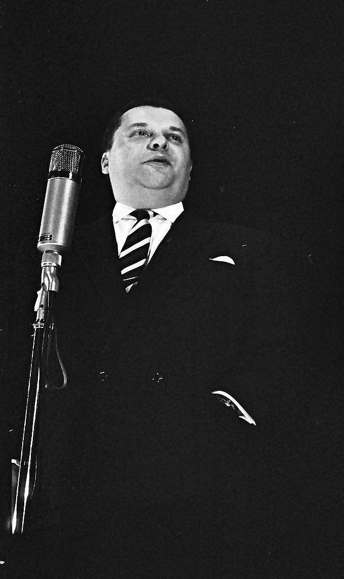 Freiburg: Stadthalle; Die Insulaner; Ekkehard Fritsch